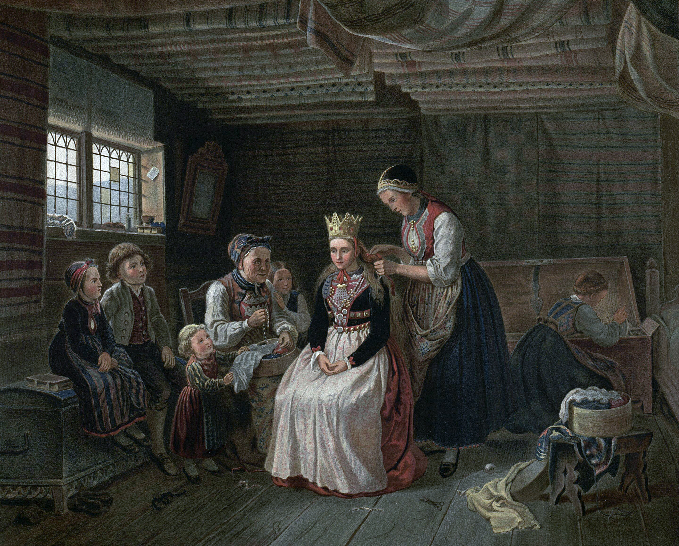 Litografi af Winckelmann & Sönner i Berlin